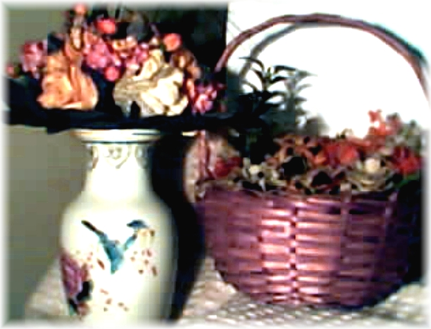 Flores artificiales de adornos - arreglos florales